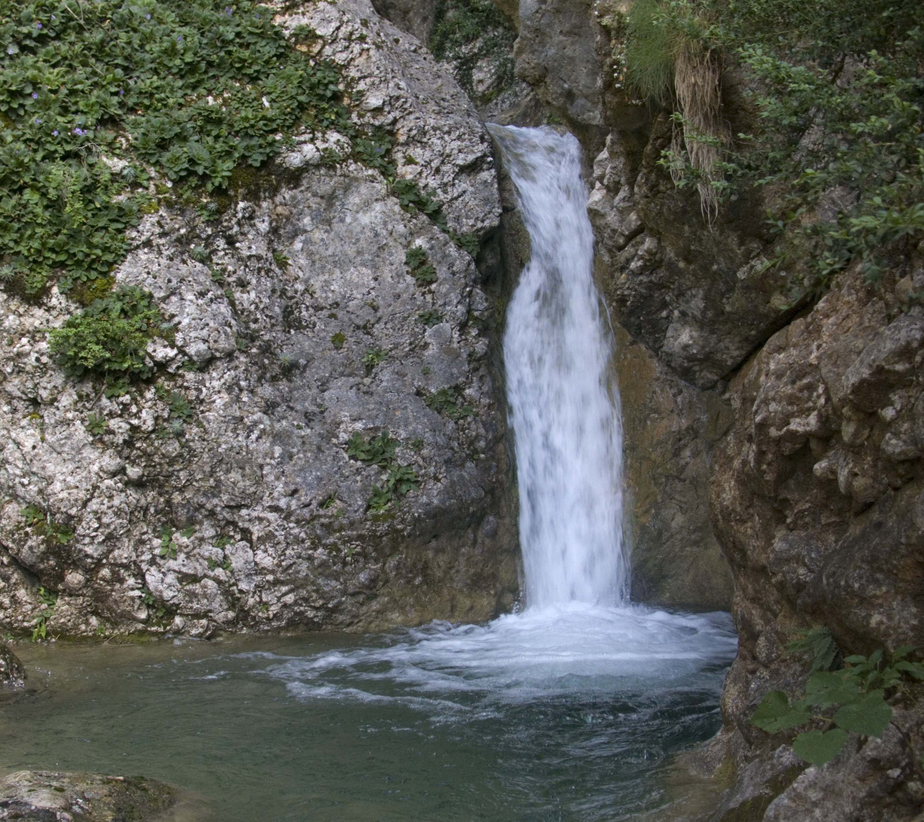 A les proximitats del poble de Castrocit, en el barranc de Castrocit. Aquest barranc és de la conca del riu Isàvena i baixa de la Serra de Sis (o serra del Cis)